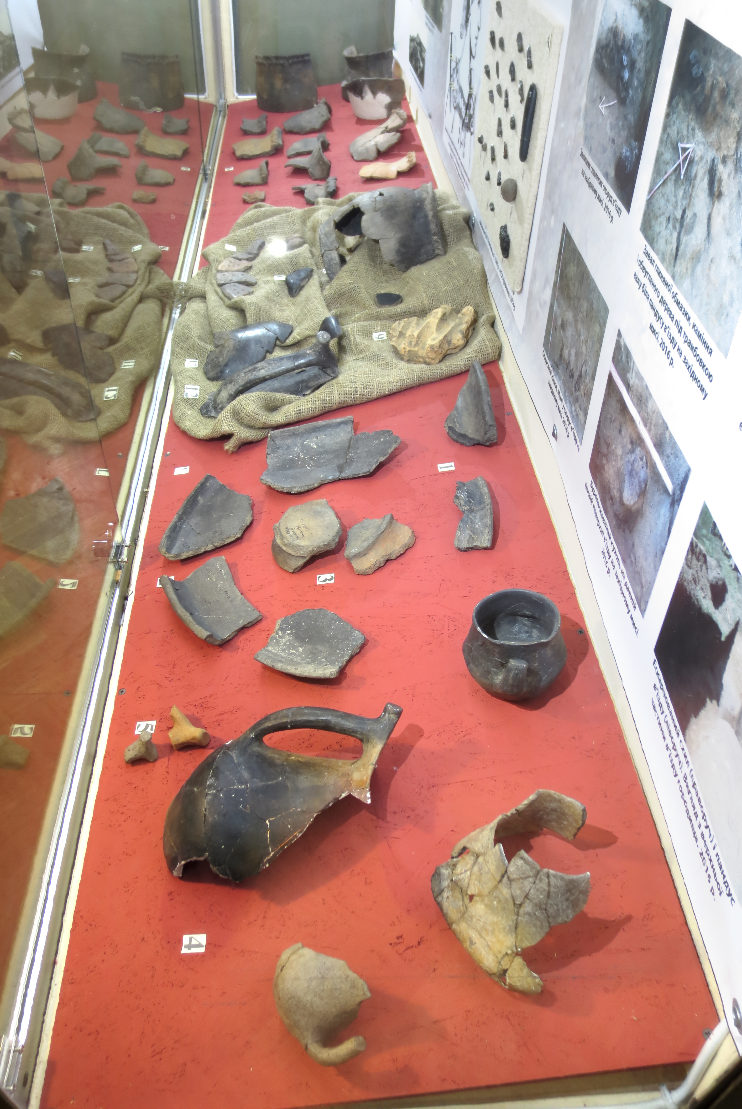 Знахідки з Хотівського городища скіфської доби в Археологічному музеї (Київ). Кераміка. На передньому плані (перед мішковиною) - столовий посуд: 1 - вінця корчаг, 2 - вінця мисок, 3 - денця мисок, 4 - кухлі, 5 - ручки кухлів.